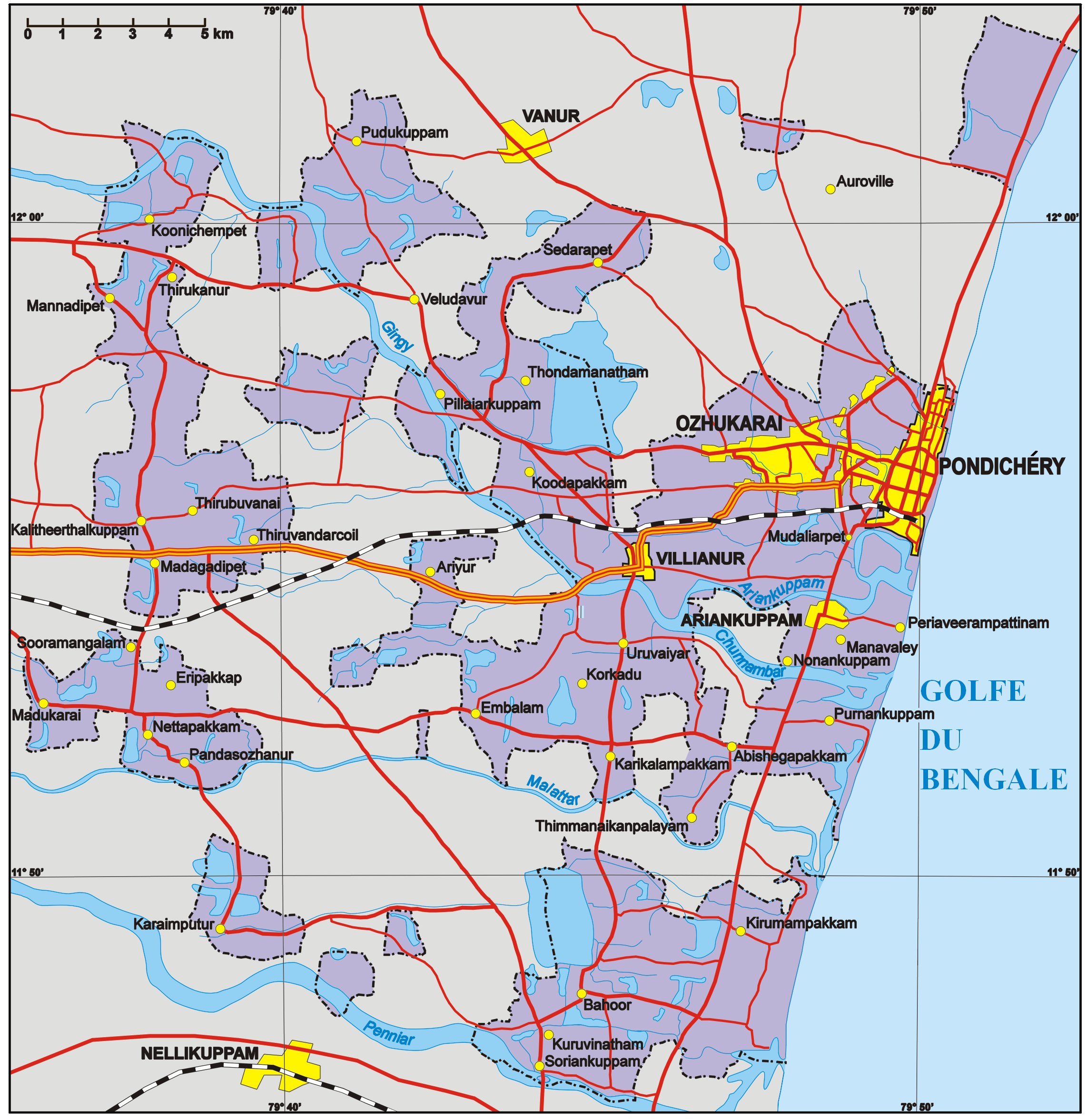 Traduction française de: Image:Pondicherry map.png